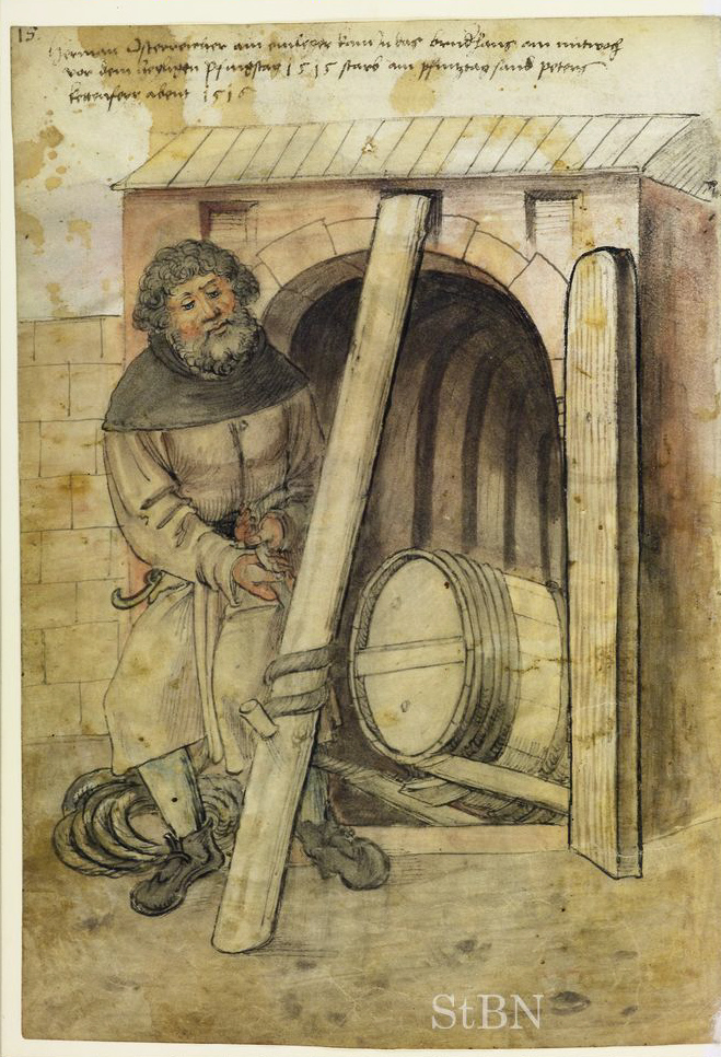 Hermann Osterreicher (Österreicher), Einleger (= Transporteur von Fässern) Näheres